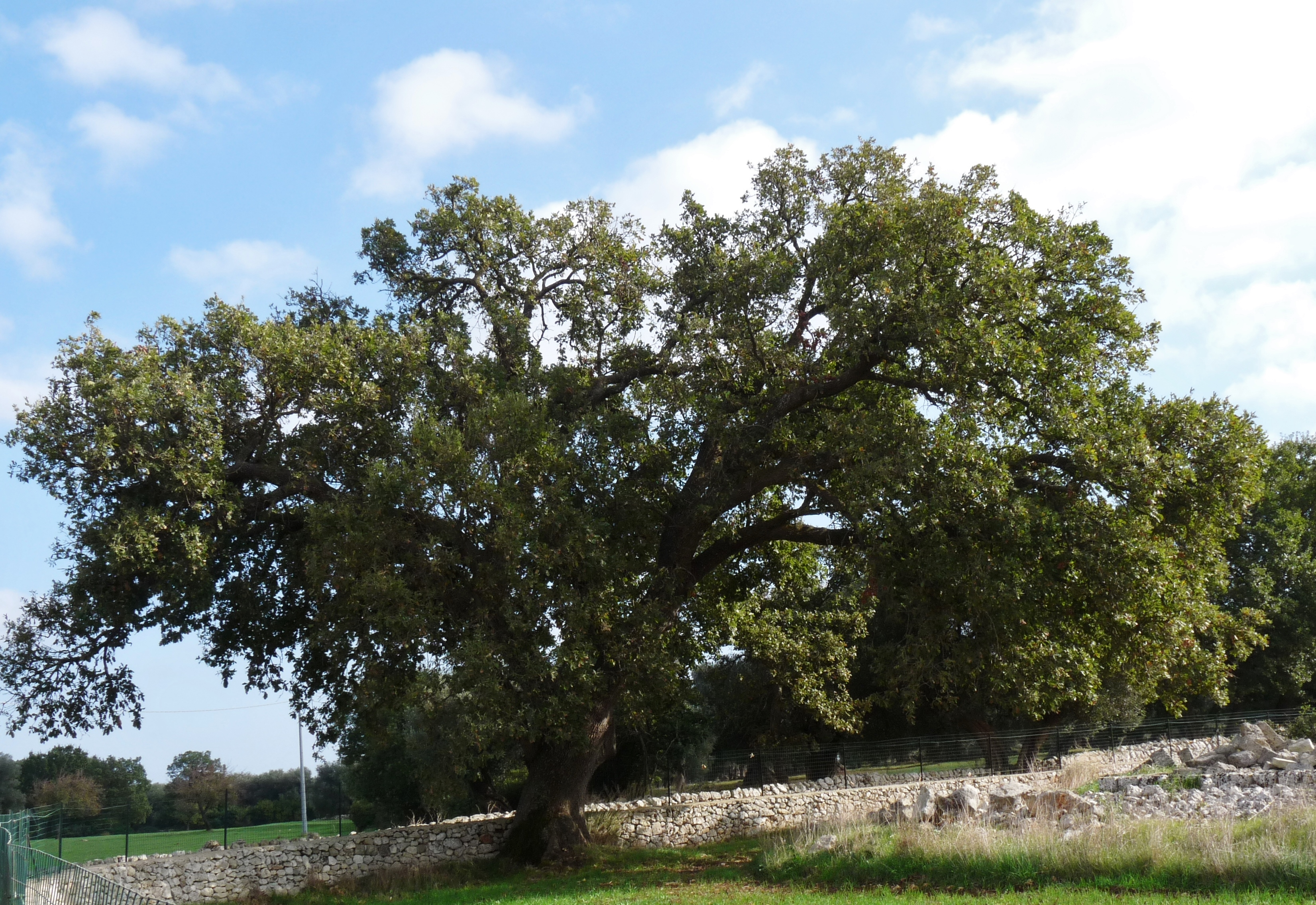 Un esemplare monumentale di Roverella (Quercus Pubescens) presente nell'agro di Ceglie Messapica a ridosso della masseria Gaetano Oliva